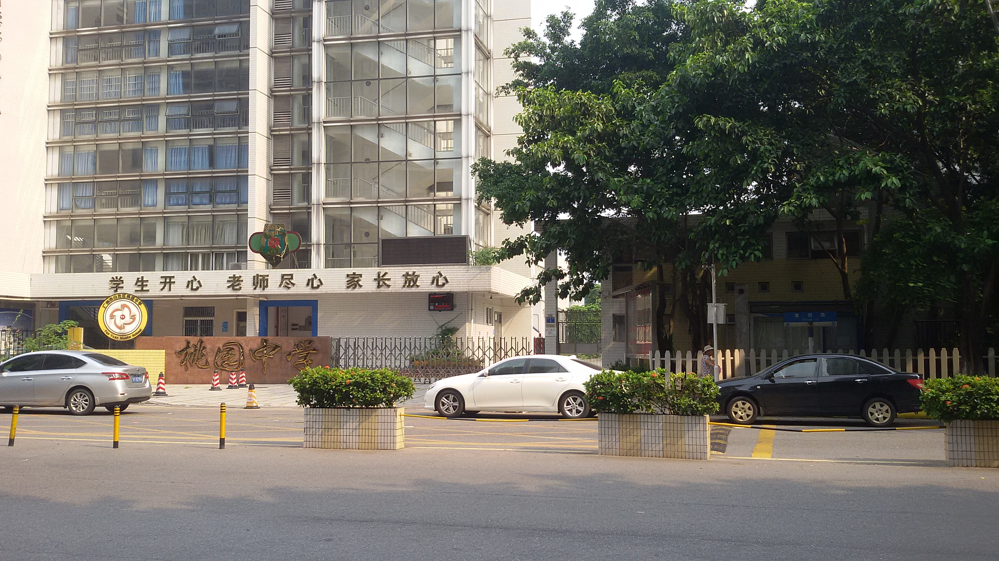 粵語: 白云区桃园中学正门